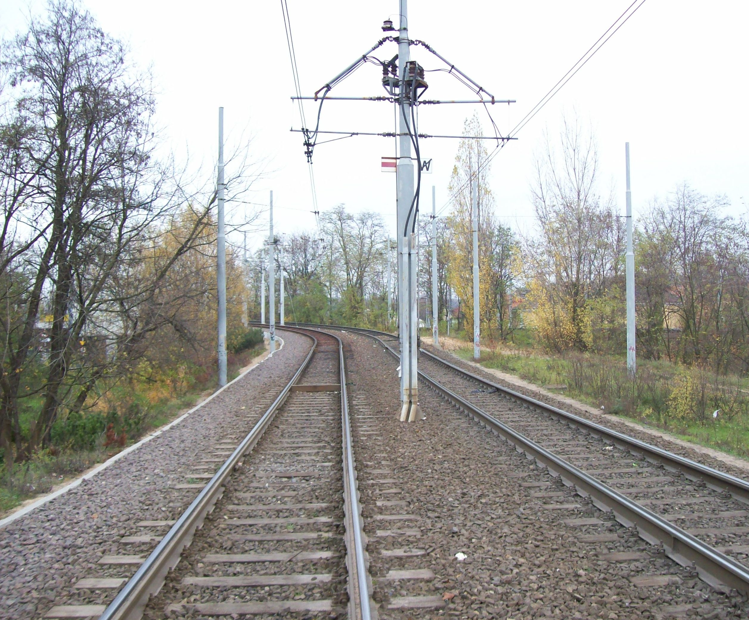 Pasando de un tranvía rápido en Poznan.